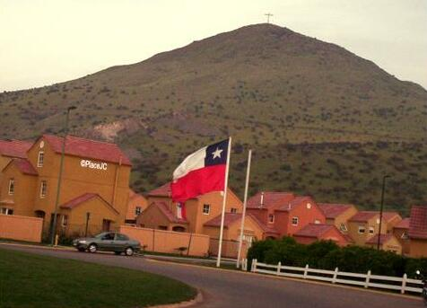 El autor de la imagen es José Cuevas Sepúlveda, que las cede a Der schöne Tod mediante autorización Wikipedia:Autorización para insertar material de Josephs con Copyright y en el about de sus fotolog.